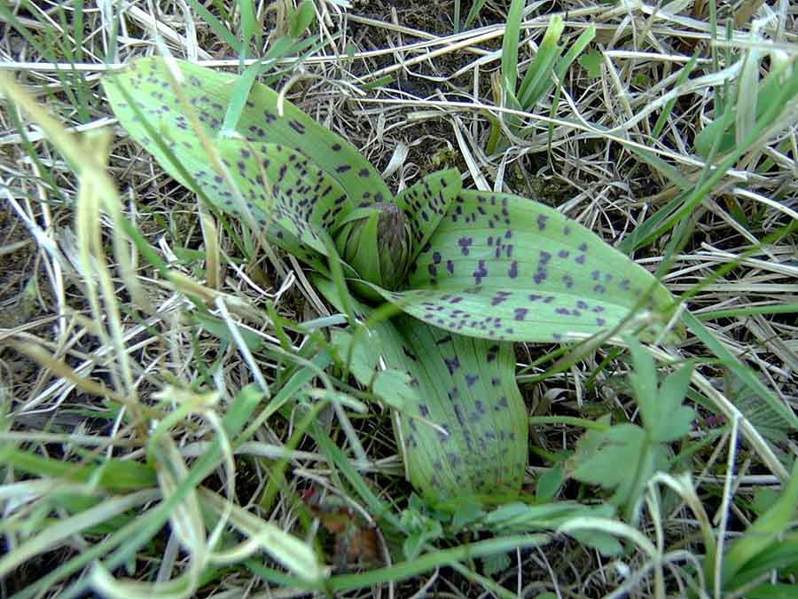 Blattrosette von Dactylorhiza majalis, bei Pretzfeld, Fränkische Schweiz, aufgenommen von Berwianr